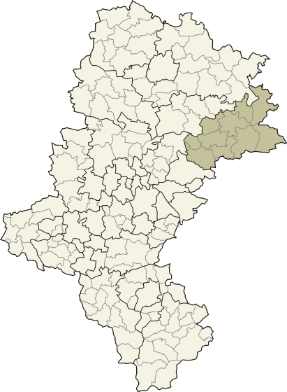 Powiat zawierciański w województwie śląskim